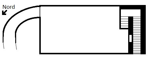 Plan de la batterie annexe nord-est du fort de Planoise, à Besançon (Doubs, France).